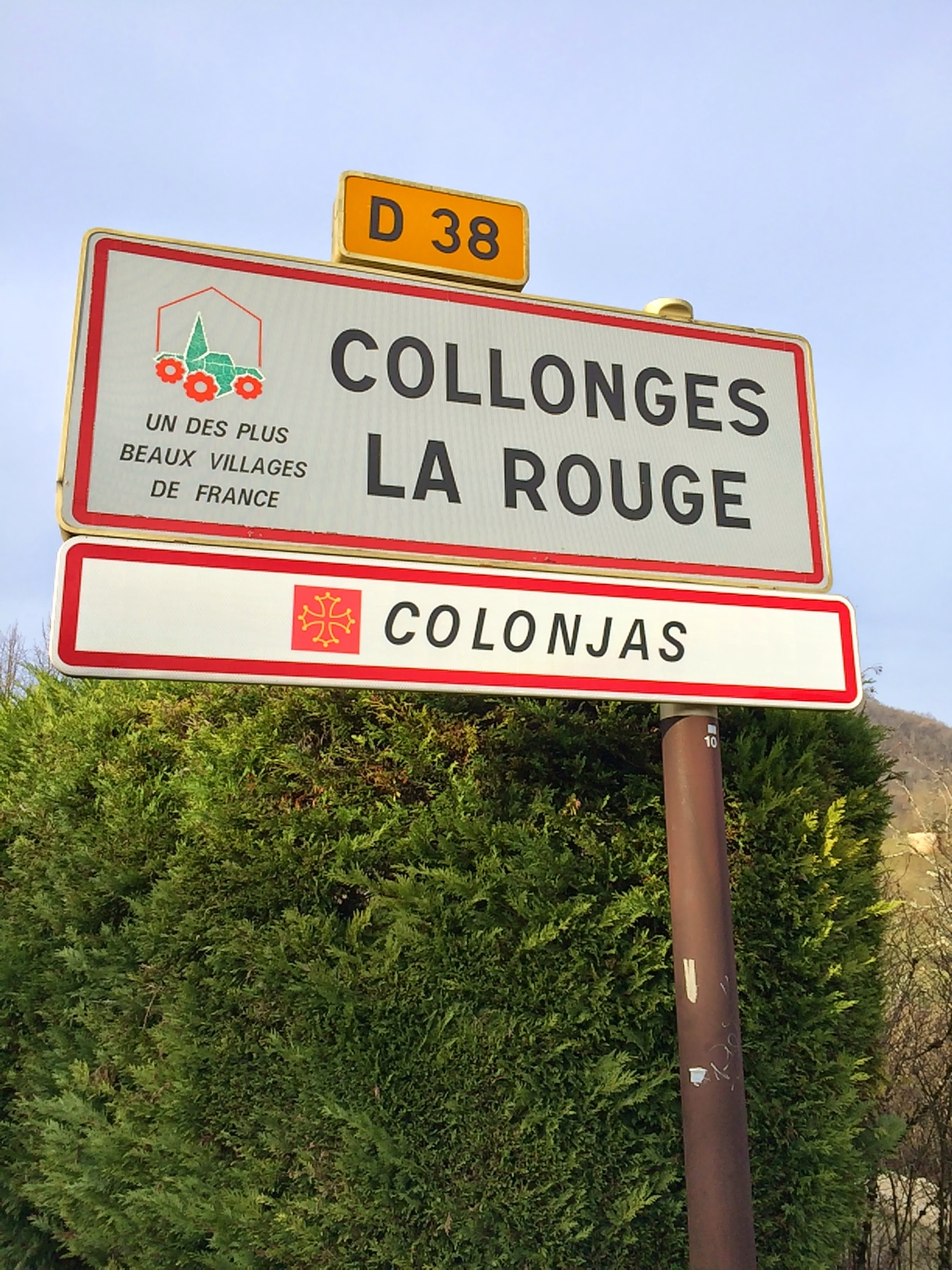 Panèl d'intrada de Colonjas.